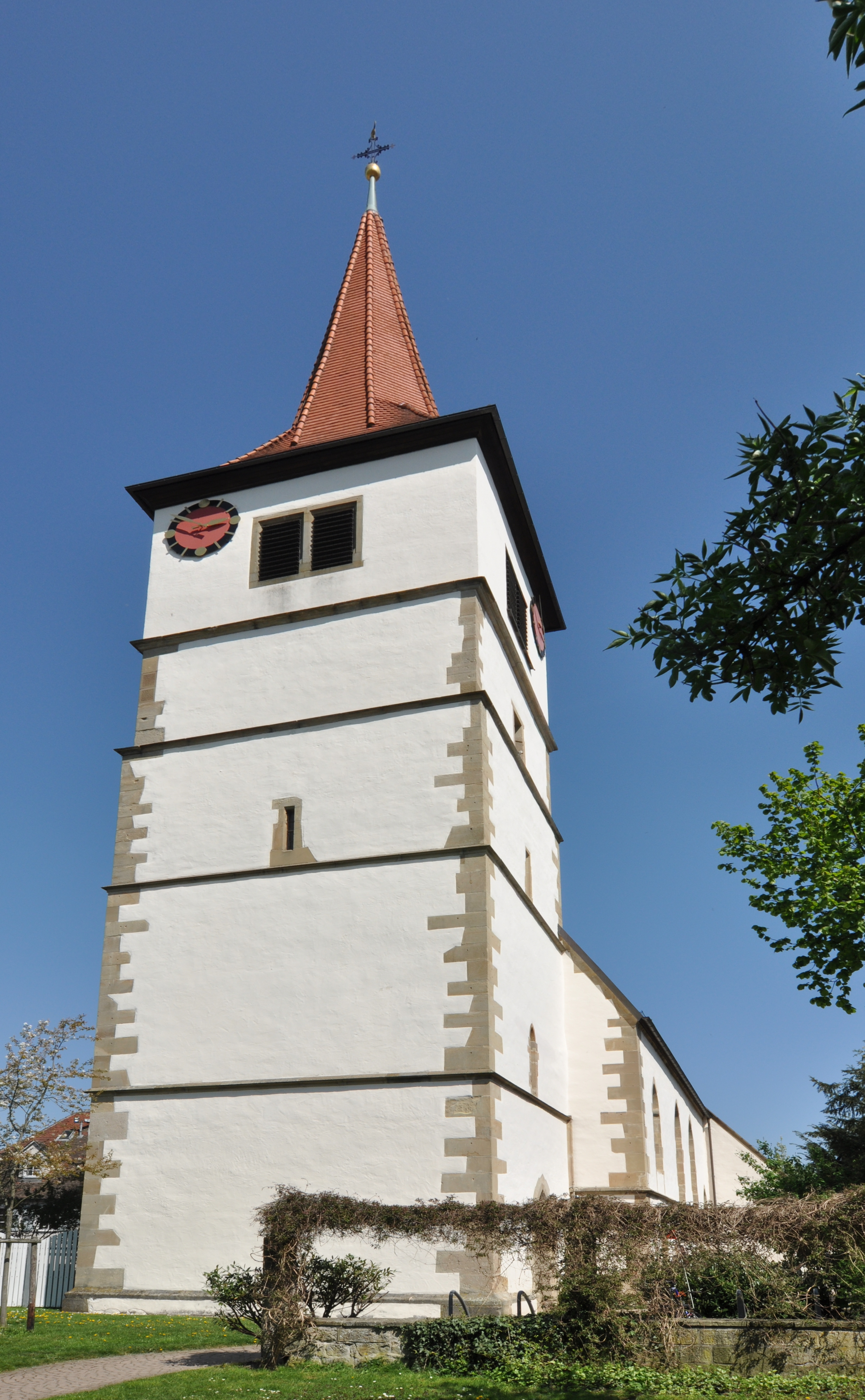 Kilianskirche in Bissingen an der Enz, Ansicht von Westen